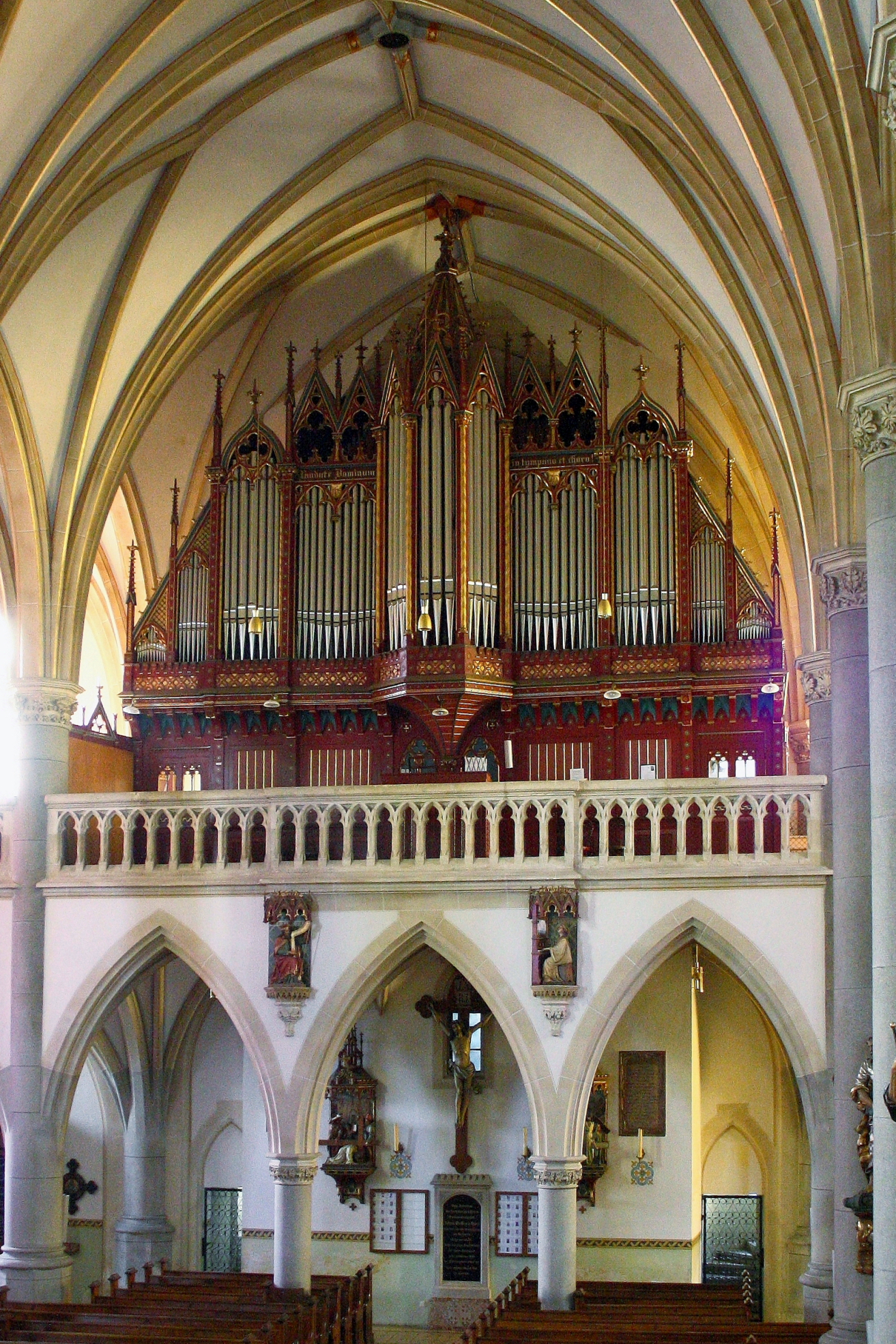 Orgel der röm.-kath. Pfarrkirche von Schwanenstadt. Erbaut 1905 von Josef Mauracher.